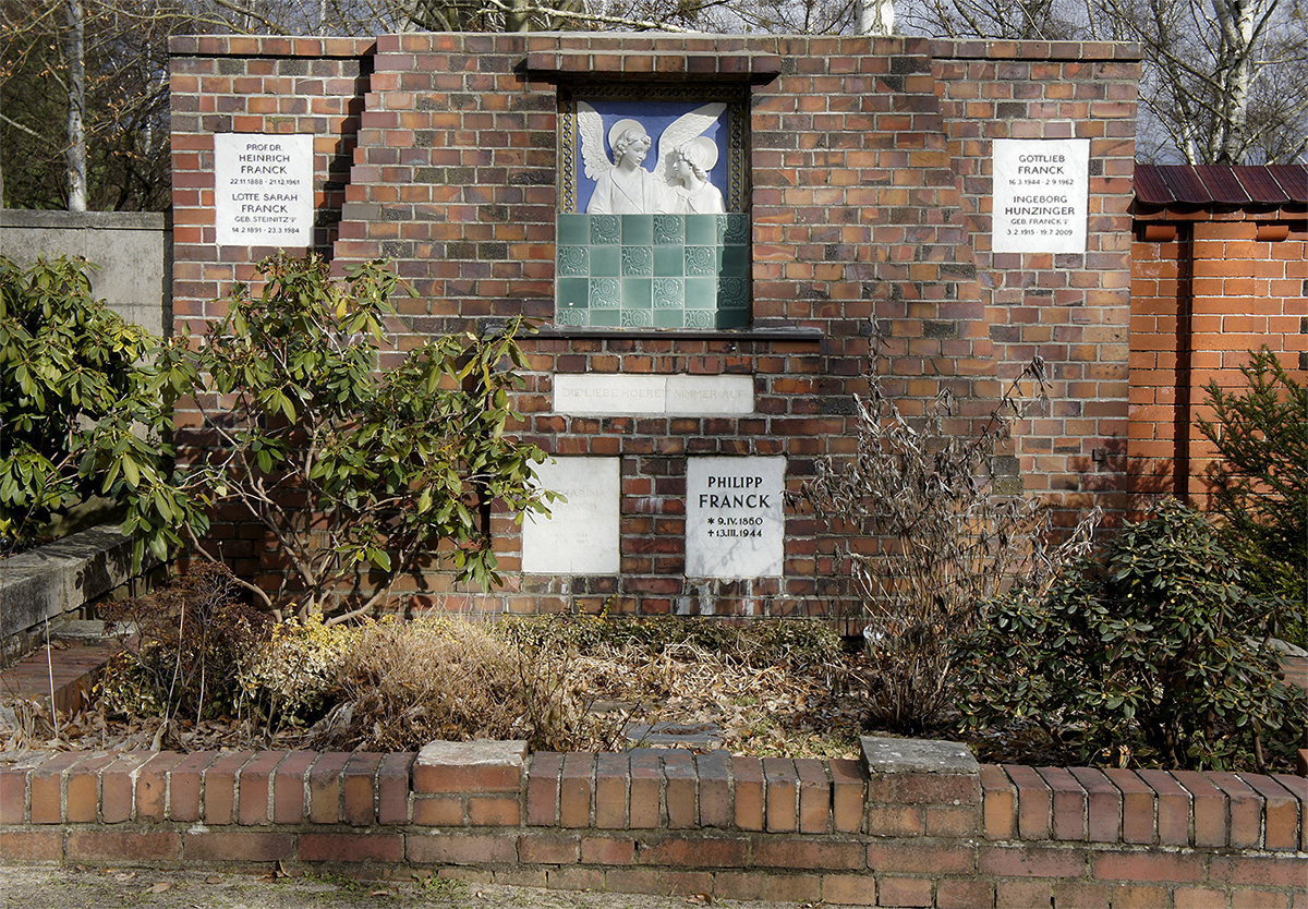 Grabstätte der Bildhauerin Ingeborg Hunzinger im Familiengrab Franck, Alter Friedhof Wannsee, Berlin